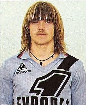 Jean-Christophe Thouvenel (1978, Paris FC), 'Panini Football 1978 - 1979', Panini figurina.